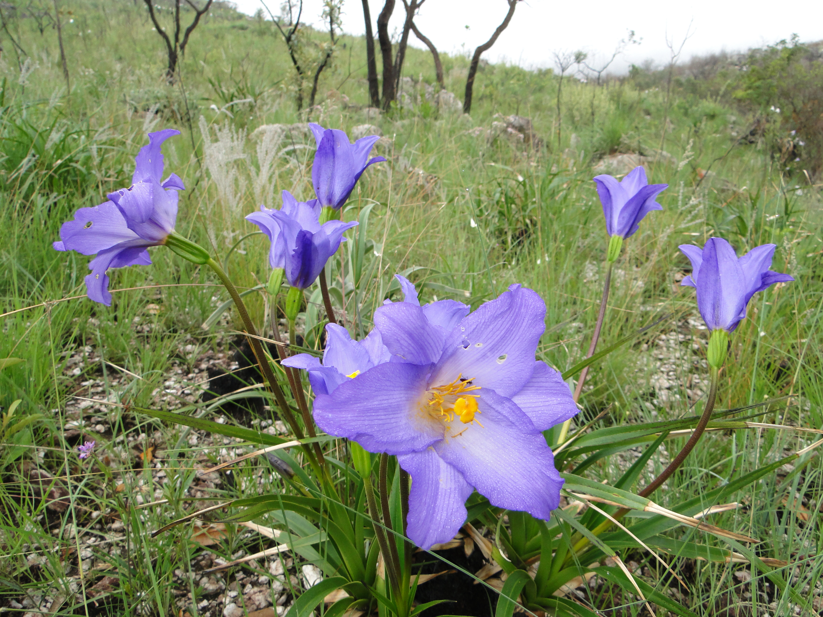 Flor do Cerrado - Canela de Ema